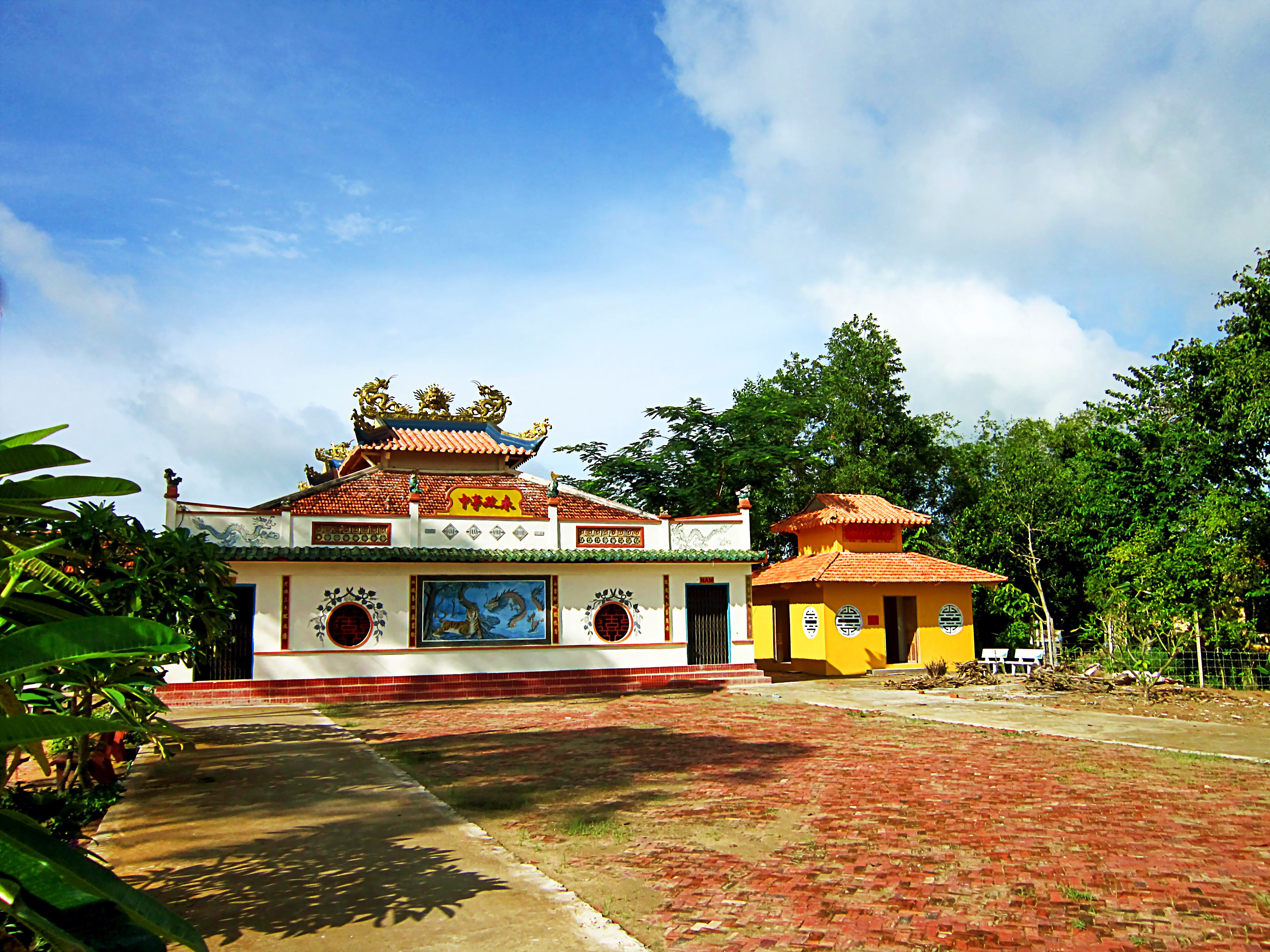 Đình Vĩnh Chánh ở xã Vĩnh Chánh, thuộc huyện Thoại Sơn, tỉnh An Giang, Việt Nam. Ngôi đình được xây dựng cách đây khoảng 170 năm.